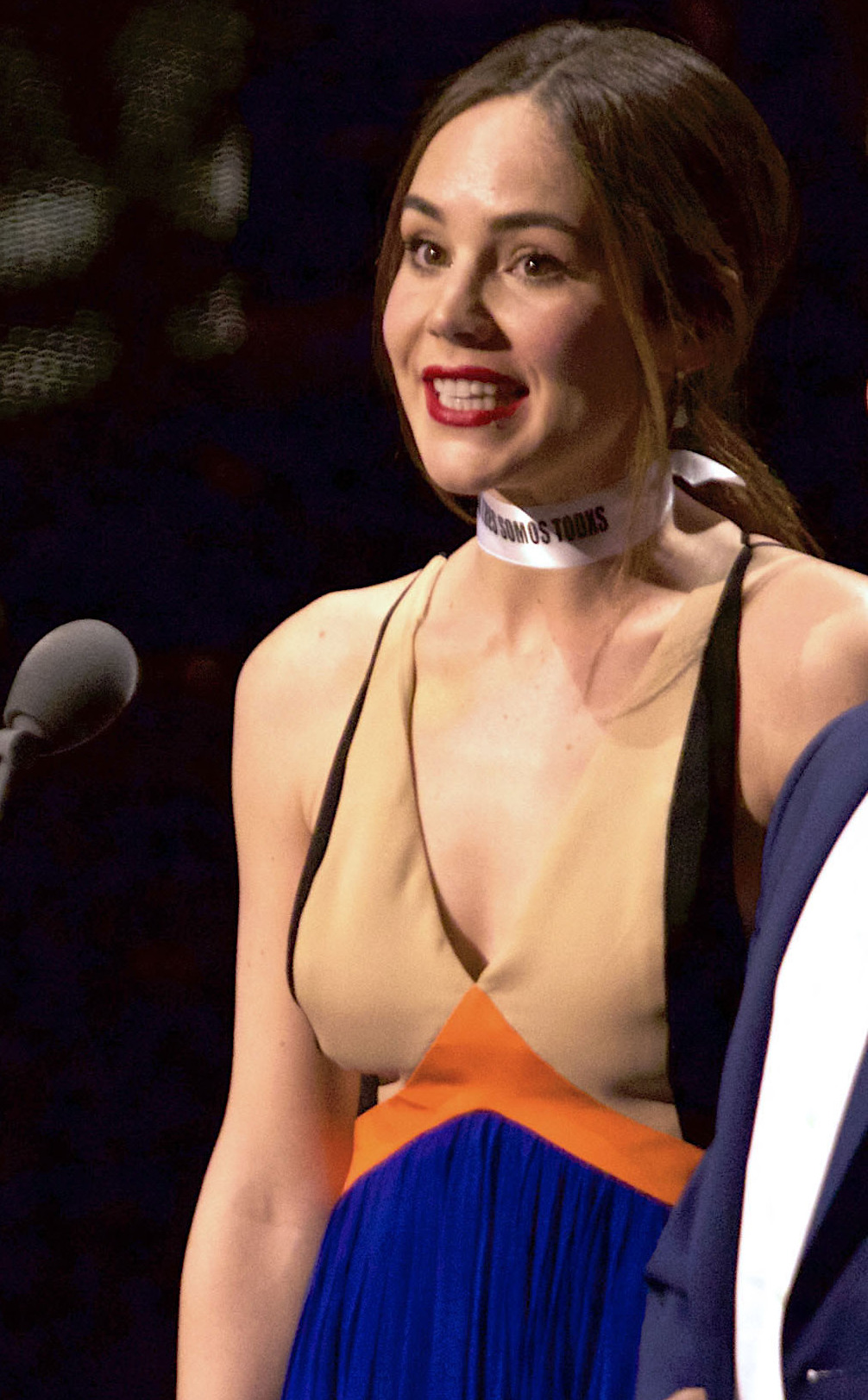 MX ENTREGA 60 ARIEL